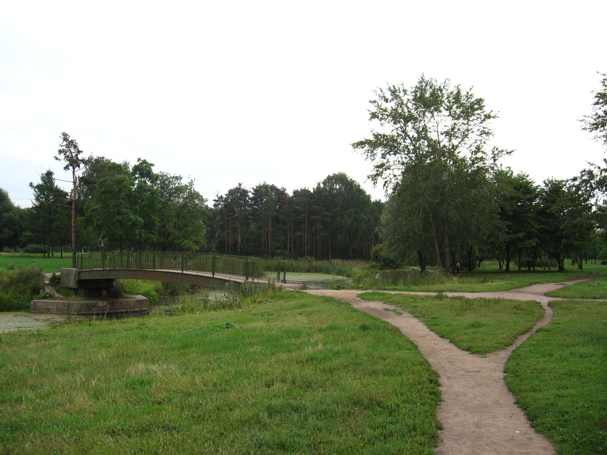 Alexandrino park in Saint Petersburg